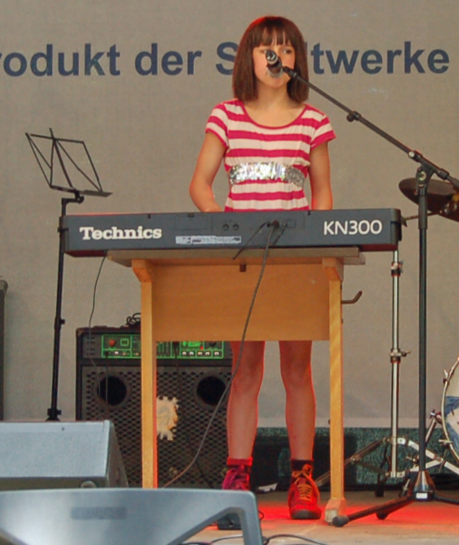 Keyboarderin einer deutschen Schulband auf der Bühne